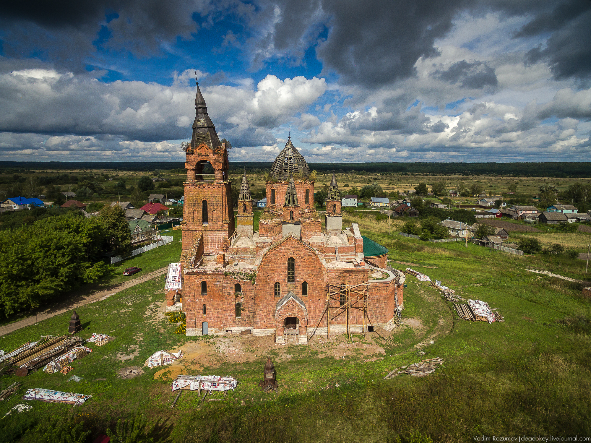 Введенская церковь: Пёт, Пителинский район, Рязанская область